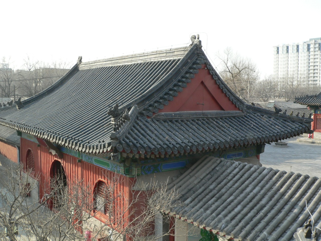 智化寺智化殿 拍摄